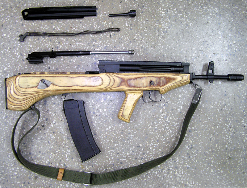 5,56 mm kbk wz.2002 BIN, field stripped